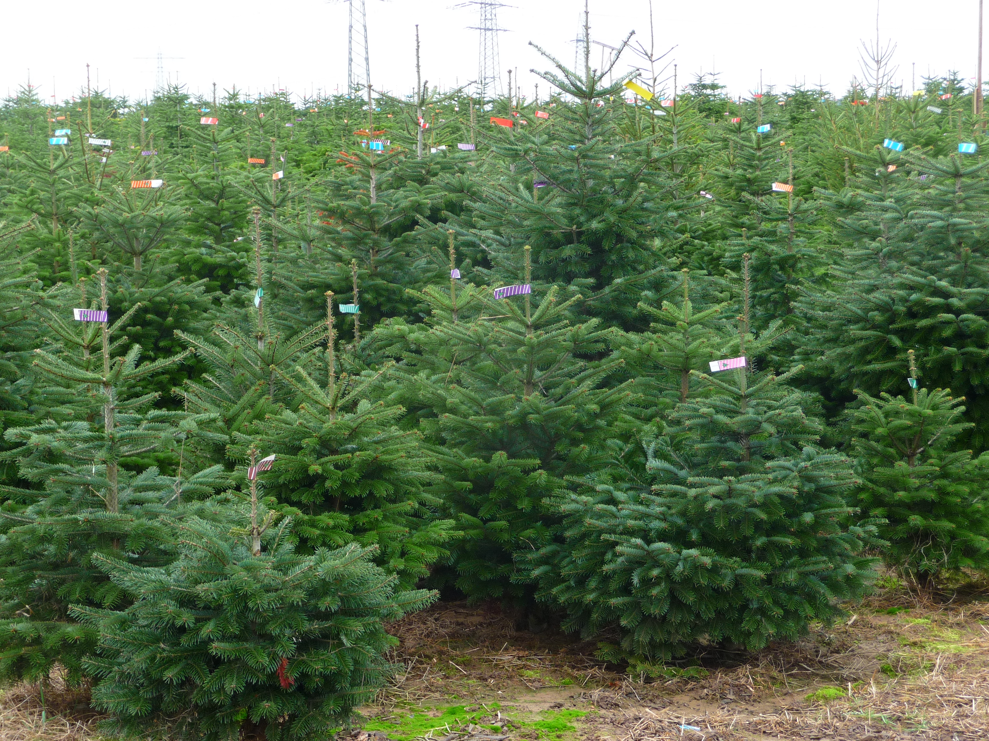 Weihnachtsbaumplantage in Baden-Württemberg, Deutschland; verkauft werden hier vorrangig Nordmanntannen, auch zum Selbstschlagen